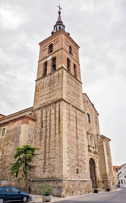 Iglesia de San Pedro Apóstol. Pueblo de Fuente el Saz del Jarama. Madrid